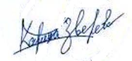 Автограф Карины Зверевой